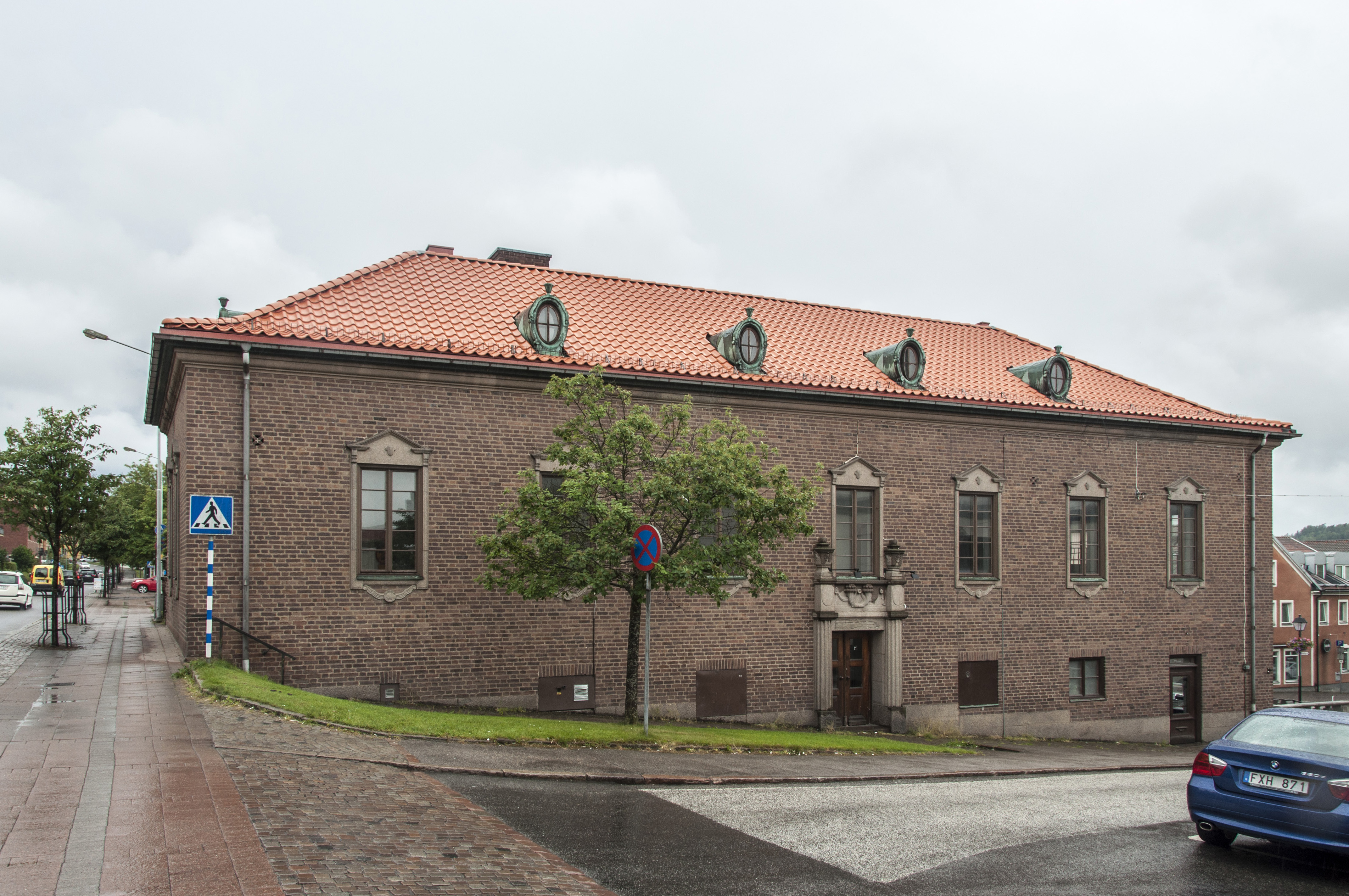 Persien 1, Järnvägsgatan 1 Ulricehamn. Ursprungligen Ulricehamns sparbank. Byggnadsår 1921. Arkitekt Ernst Torulf